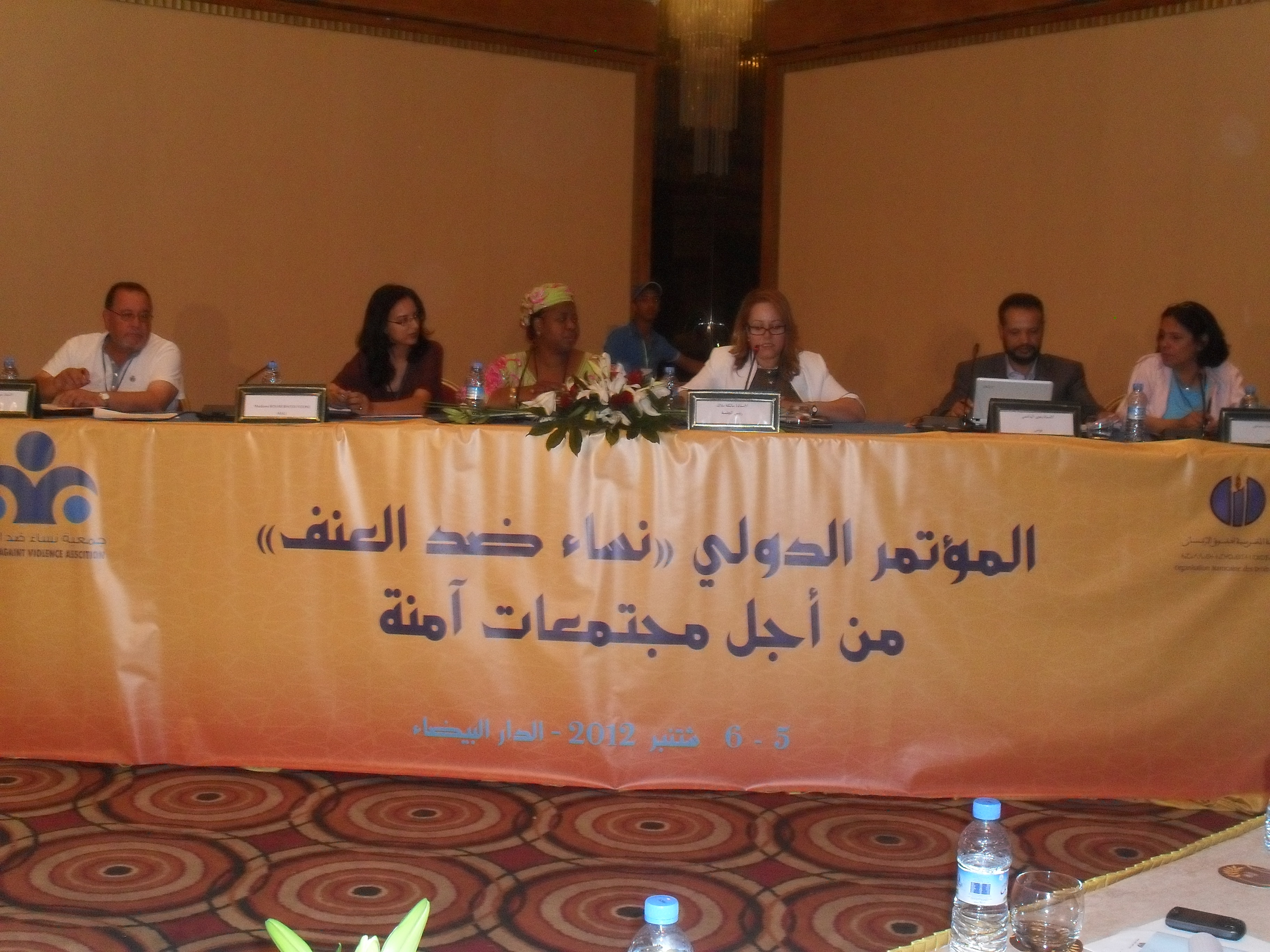 Attendees at the "Women Against Violence" conference in Casablanca say women and families suffer most from salafist violence. مشاركات في مؤتمر "نساء ضد العنف" الذي عقد في الدارالبيضاء يقلن إن النساء والأسر يعانون أكثر من غيرهم من العنف السلفي. Les participants à la conférence "Women Against Violence" qui s'est tenue à Casablanca affirment que ce sont les femmes et les familles qui souffrent le plus de la violence salafiste.